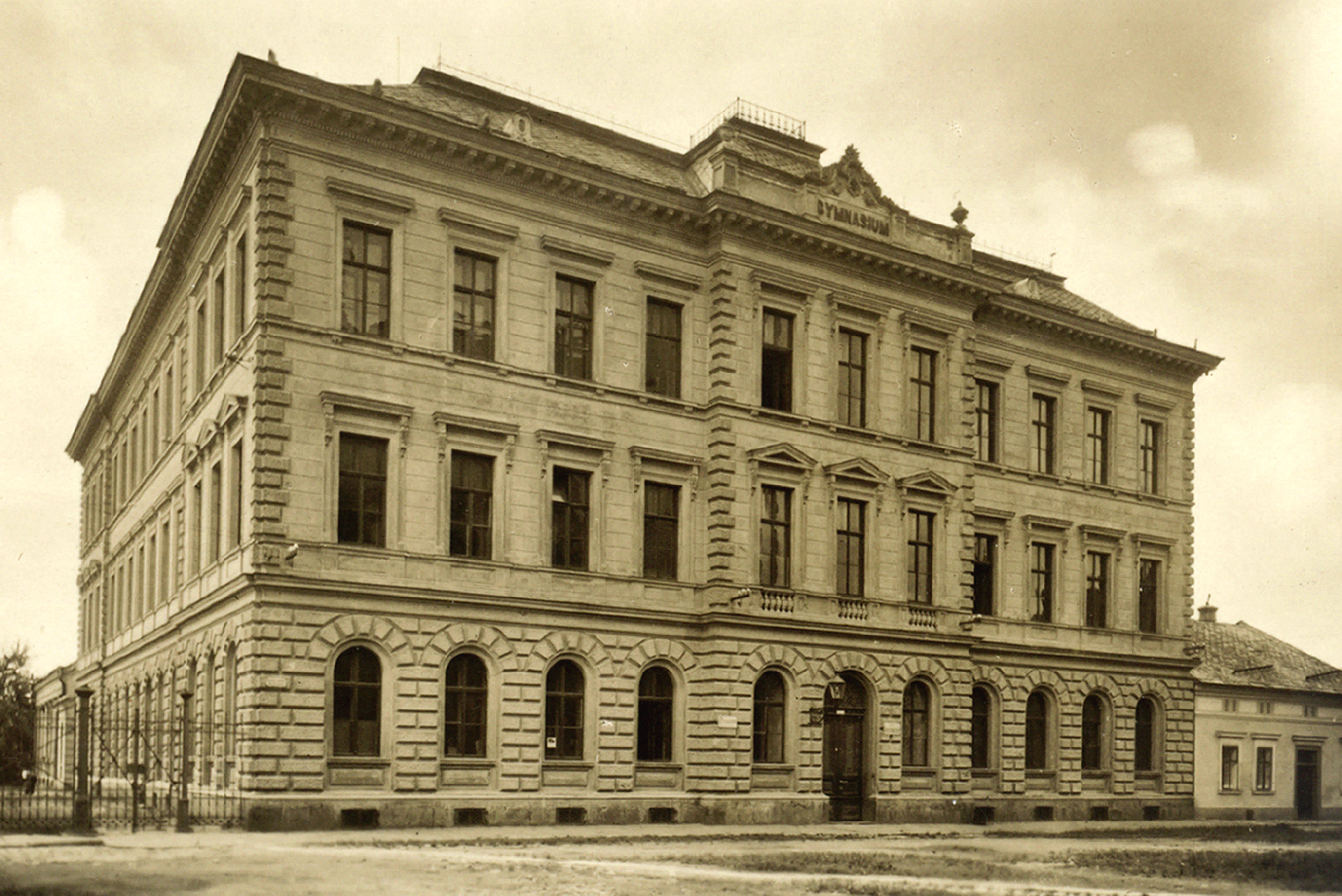 Reálné gymnázium v Uničově (něm. Mährisch Neustadt) bylo založeno roku 1870. Od roku 1880 sídlilo v nové budově na dnešním Kostelním náměstí.